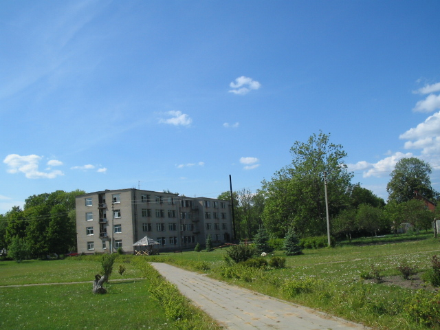 Švėkšnos sanatorinės mokyklos bendrabutis